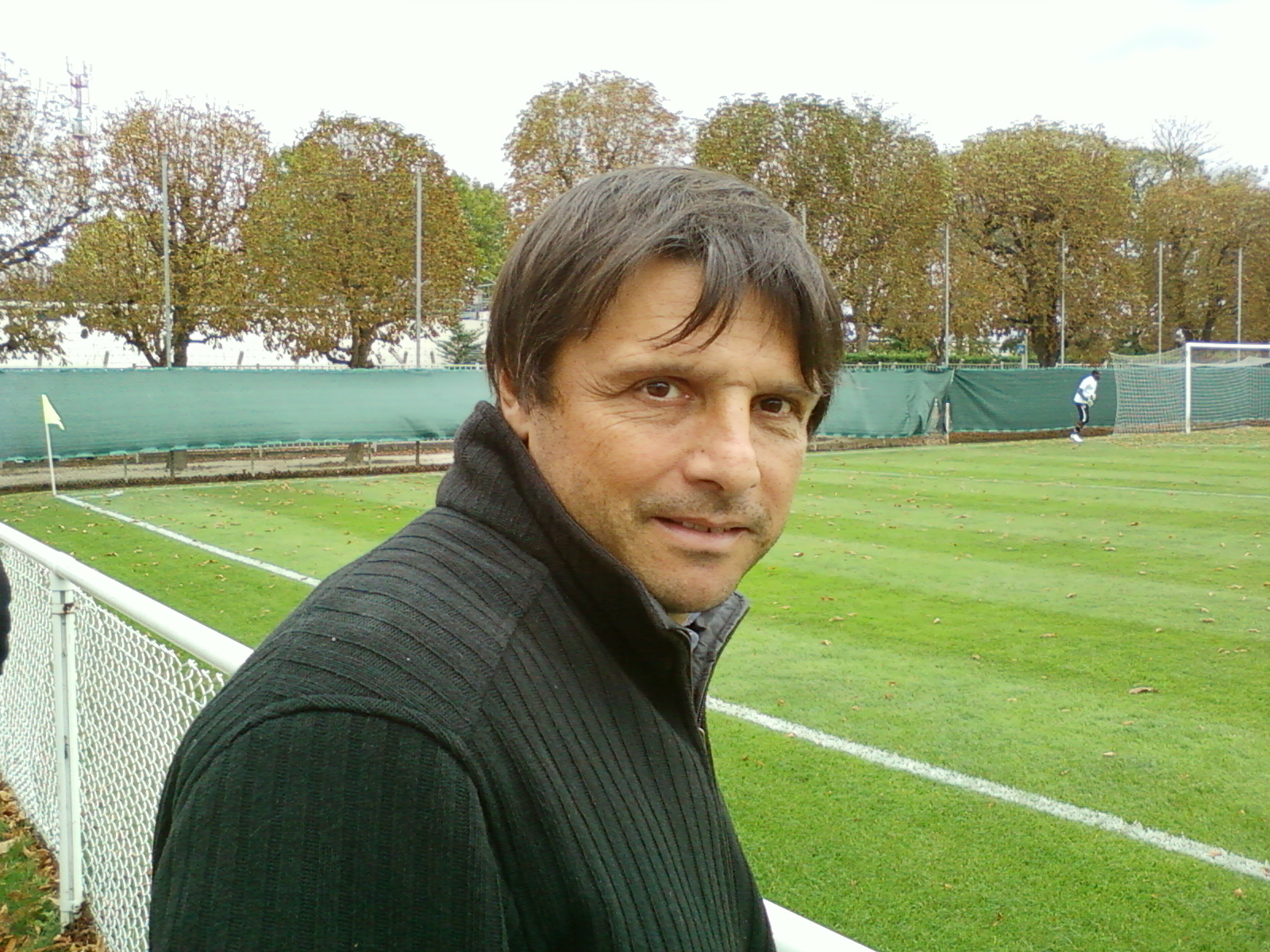 Laurent Fournier au Camp des Loges lors du match de CFA Paris SG B - Auxerre B (1-2) du 08 octobre 2011